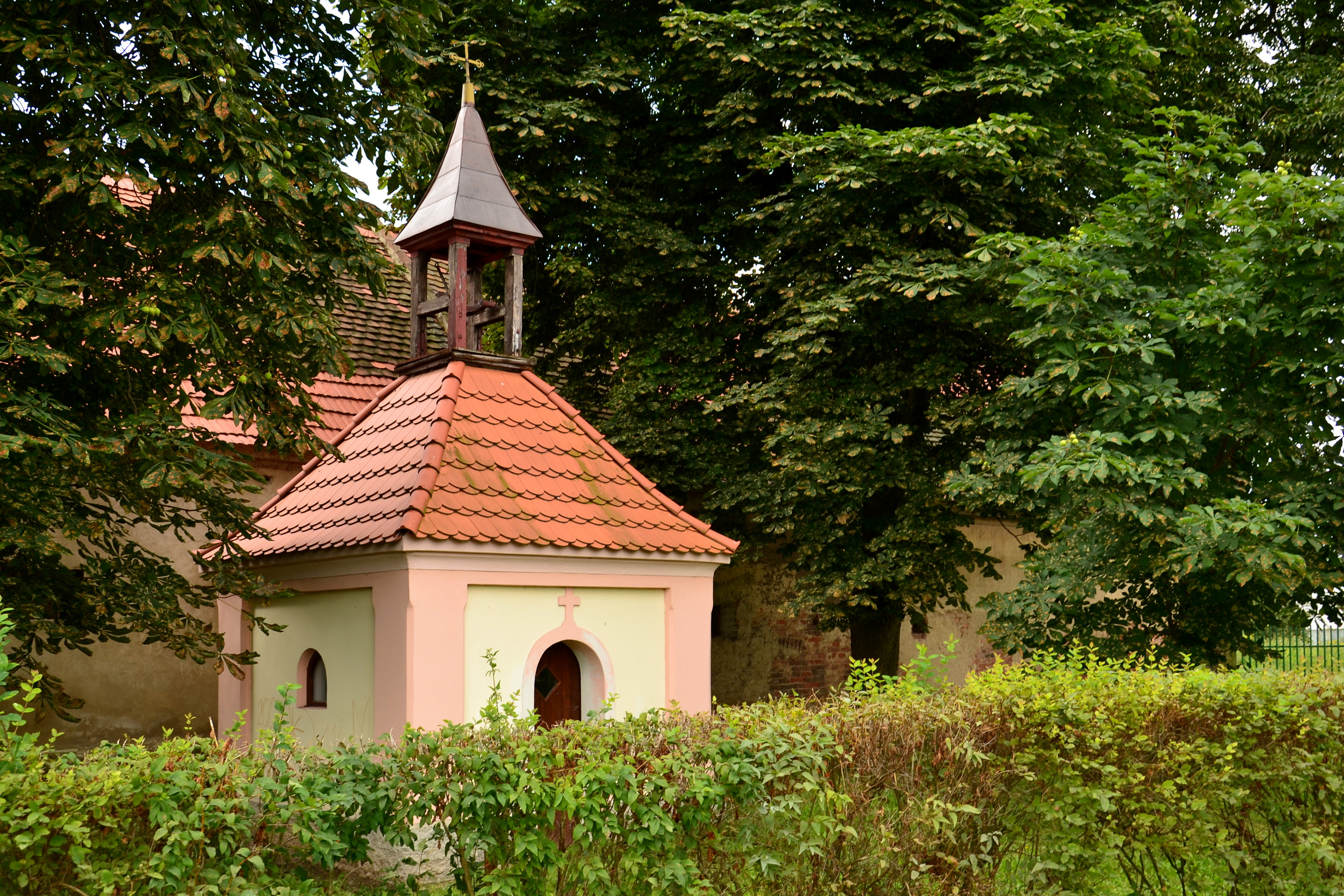 Chbany - kaple na návsi